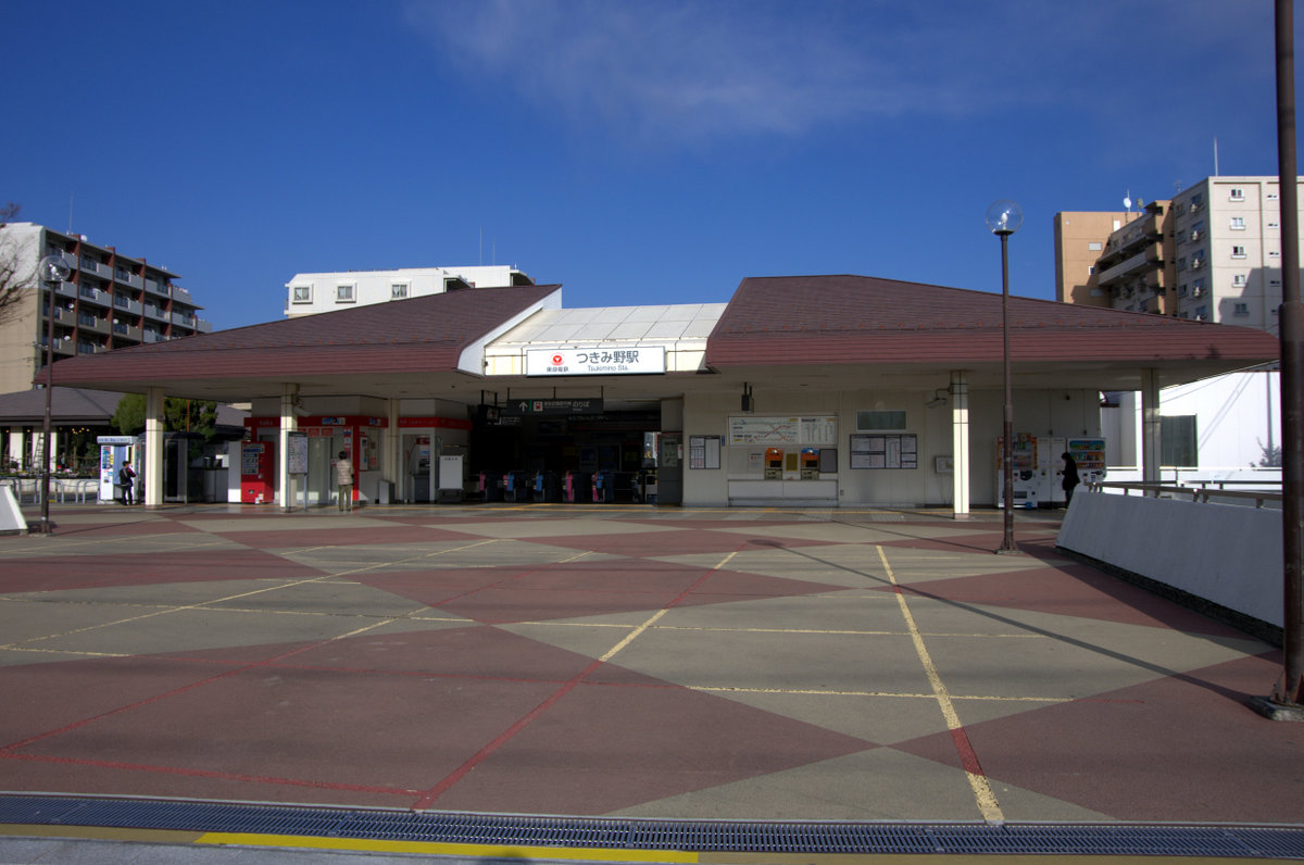 東京急行電鉄田園都市線つきみ野駅駅舎